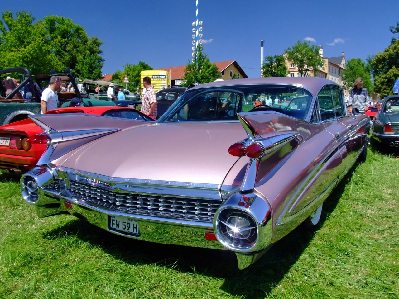 Quelle: selbst fotografiert, 06/2007 Fotograf: Späth Chr.